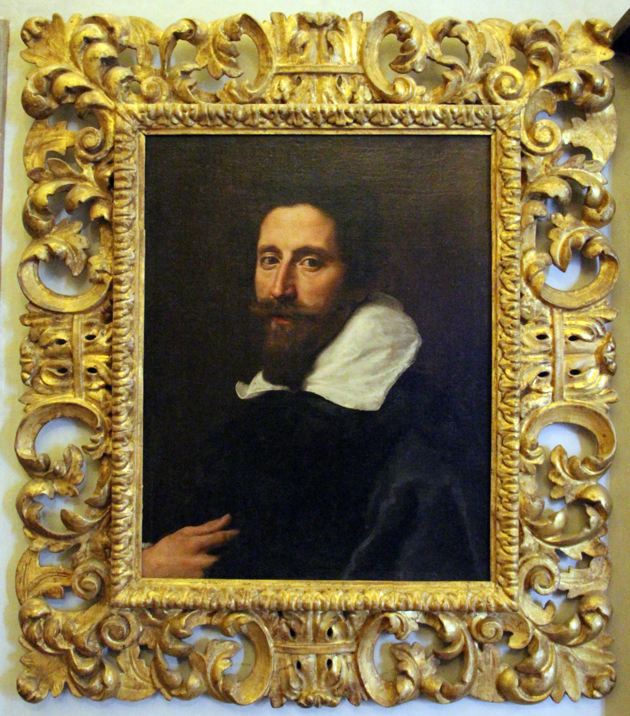 Casa Buonarroti - Camera della Notte e Dì